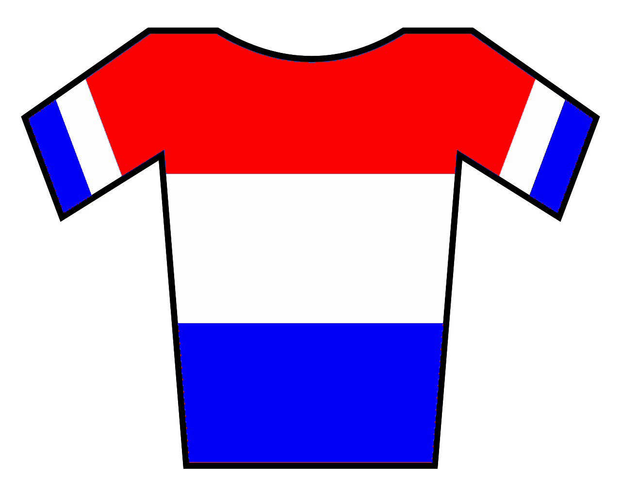 Maillot de Países Bajos